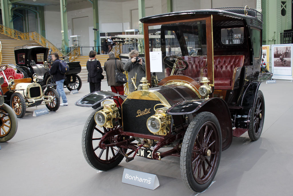 1903 Beliet 20CV Demi Limousine_IMG_0796